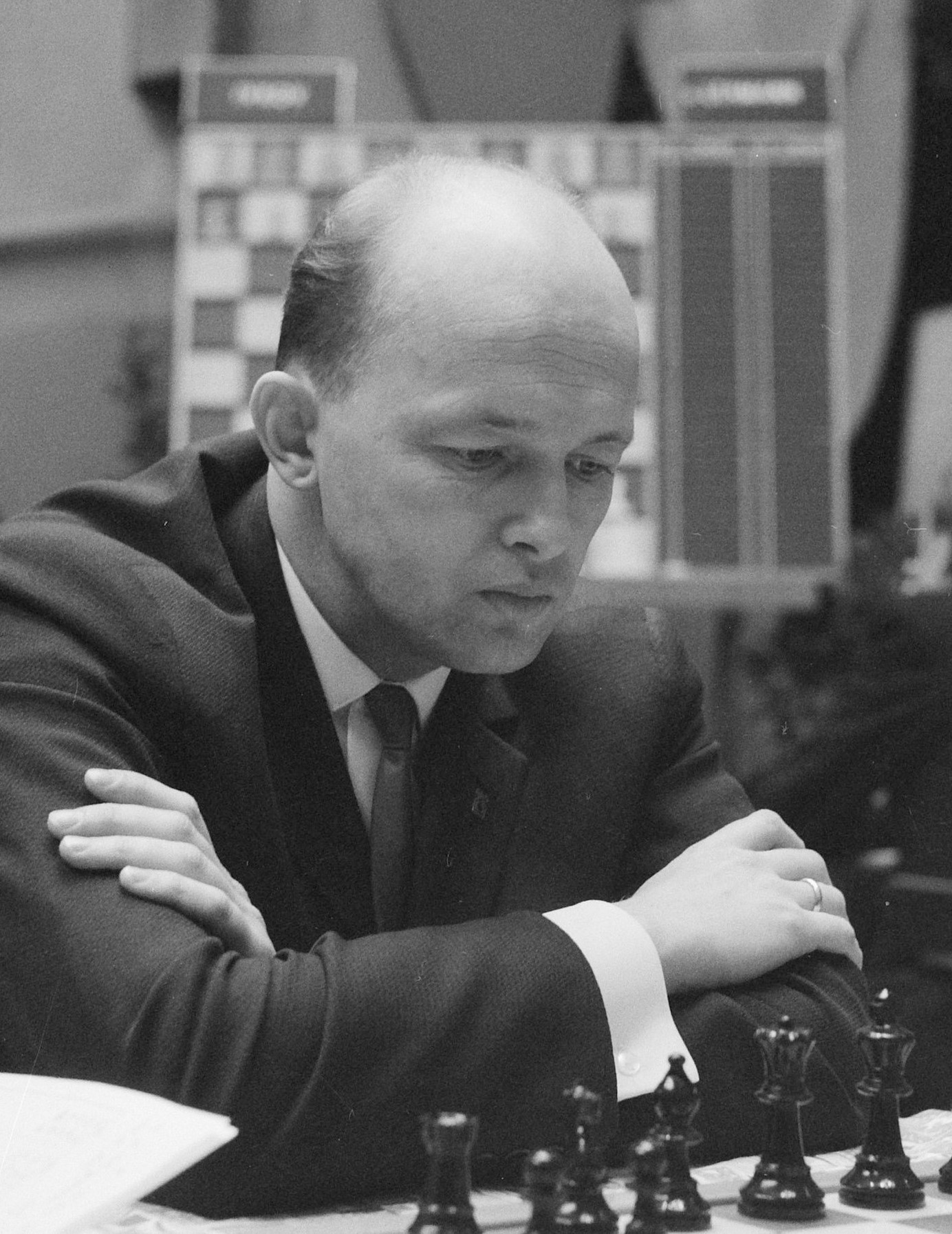 28e Hoogoven schaaktoernooi te Beverwijk, de Rus Nei